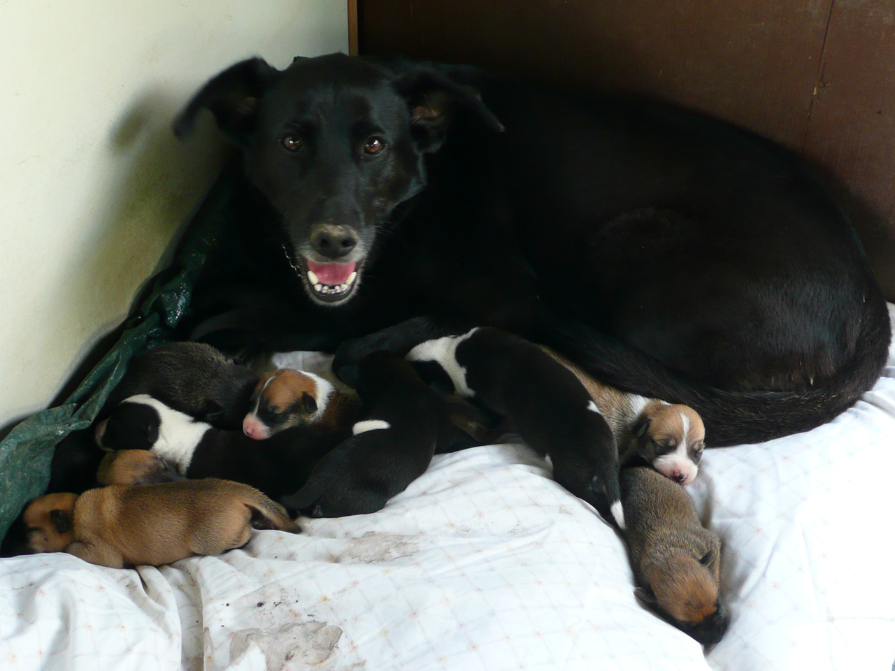 Labrador Retrievers